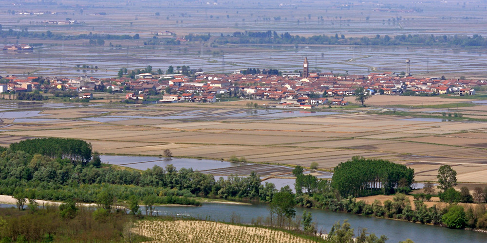 Panorama di Fontanetto Po (VC) dalle colline del Monferrato casalese.